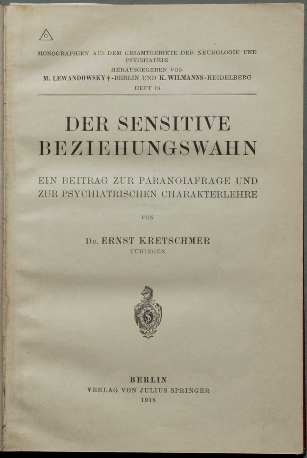 Kretschmer, Ernst: Der sensitive Beziehungswahn. Ein Beitrag zur Paranoiafrage und zur psychiatrischen Charakterlehre. Berlin: J. Springer 1918, 1 Blatt Titel verso Druckvermerk + 1 Blatt Vorwort verso Inhaltsverzeichnis + 166 Seiten + 1 Blatt Verlagsanzeigen. - Schriftenreihe Monographien aus dem Gesamtgebiete der Neurologie und Psychiatrie / herausgegeben von M. Lewandowsky - Berlin und K. Wilmanns - Heidelberg / Heft 16. 1.Auflage.